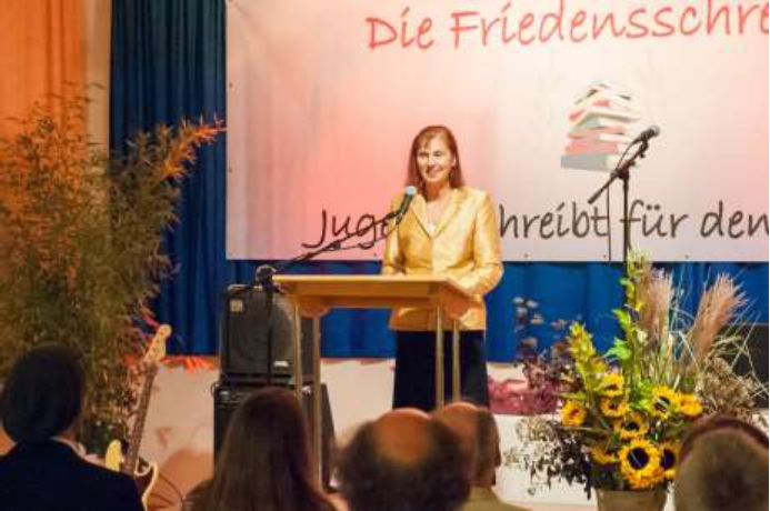 Helene Walterskirchen als Moderatorin bei der Preisverleihungsfeier Die FRIEDENSSCHREIBER 2014